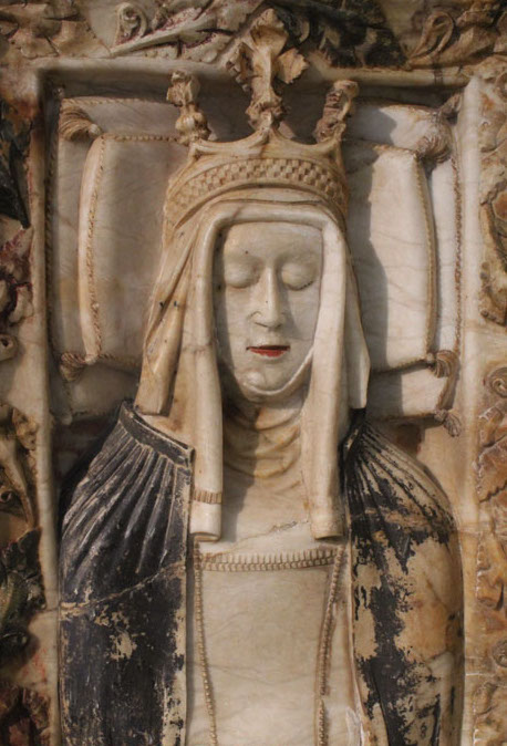 Detalle del Sepulcro de Beatriz de Portugal.